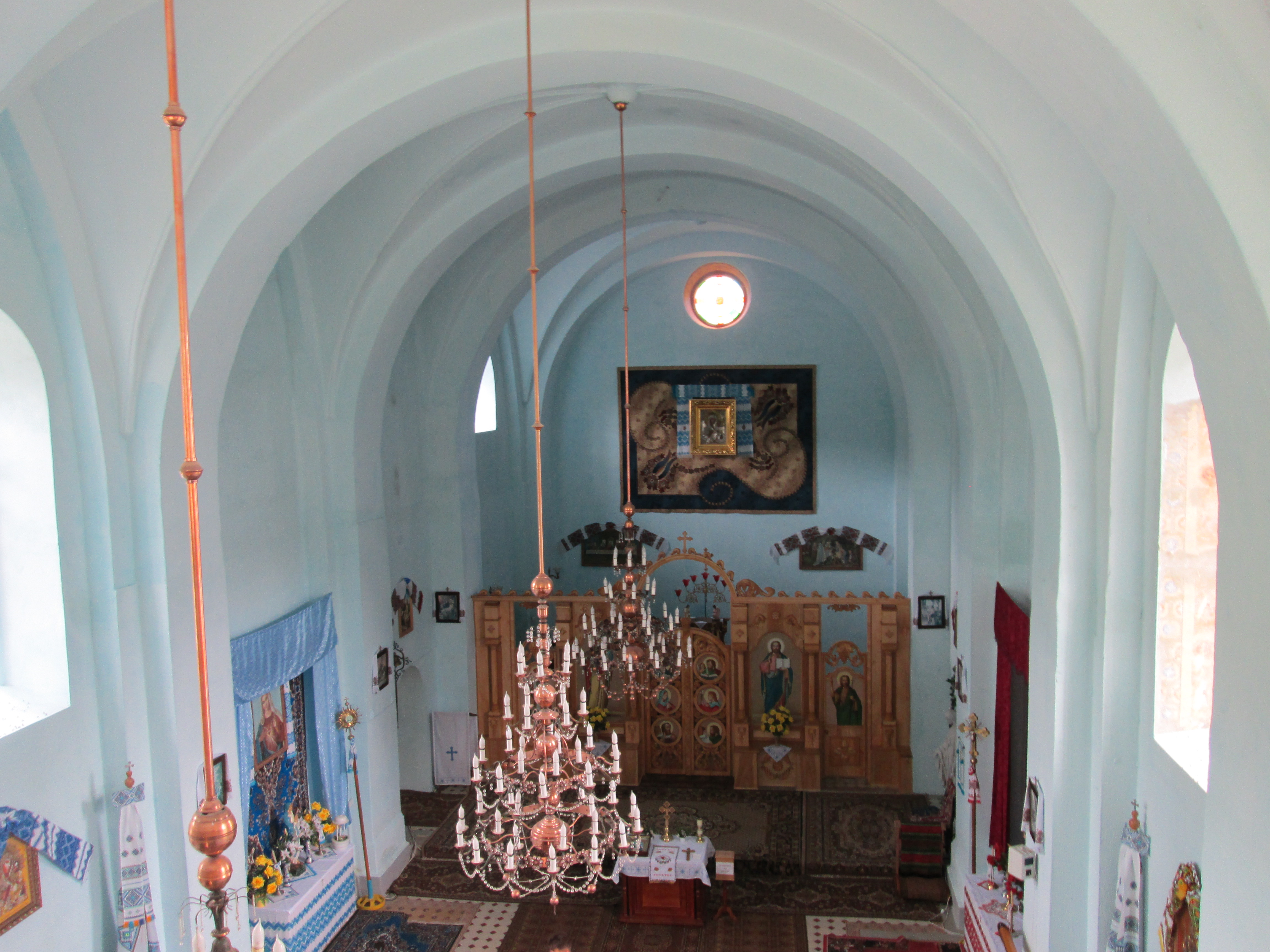 Монастир Різдва святого Івана Хрестителя. Церква різдва Івана Хрестителя, інтер'єр. Село Краснопуща Бережанського району Тернопільської області.